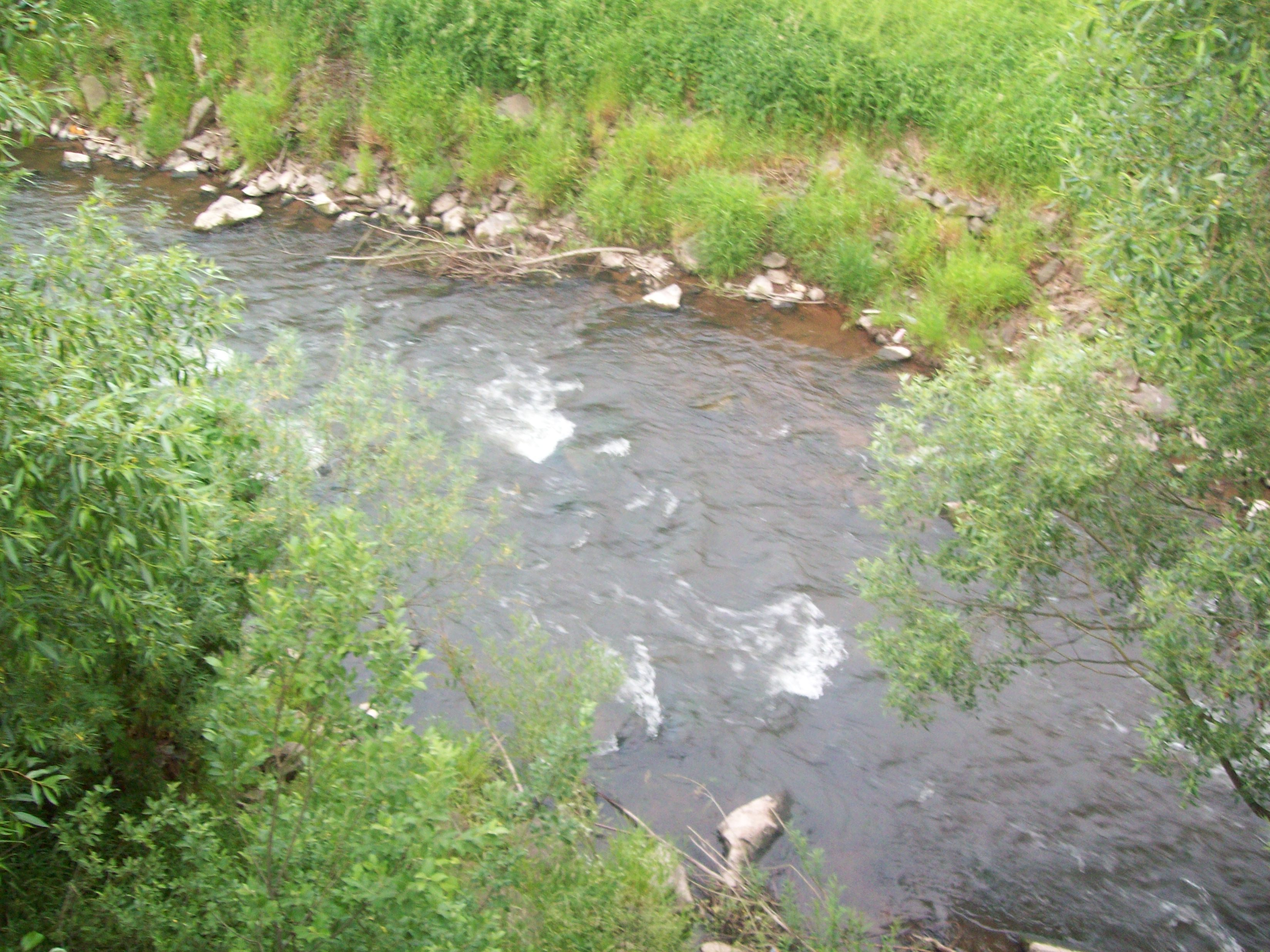 Ścinawka w Kłodzku-Ustroniu